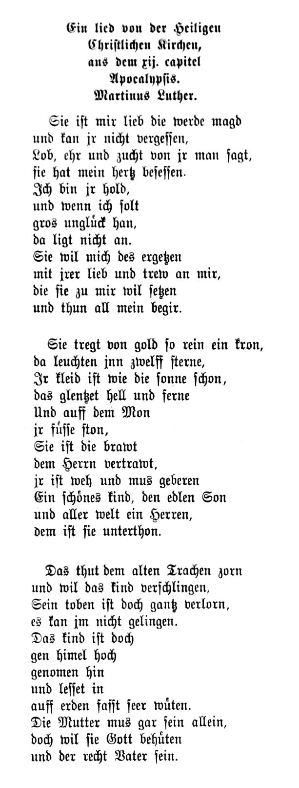 Martin Luther: Sie ist mir lieb, die werte Magd, Edition WA 35 nach dem Erstdruck 1535